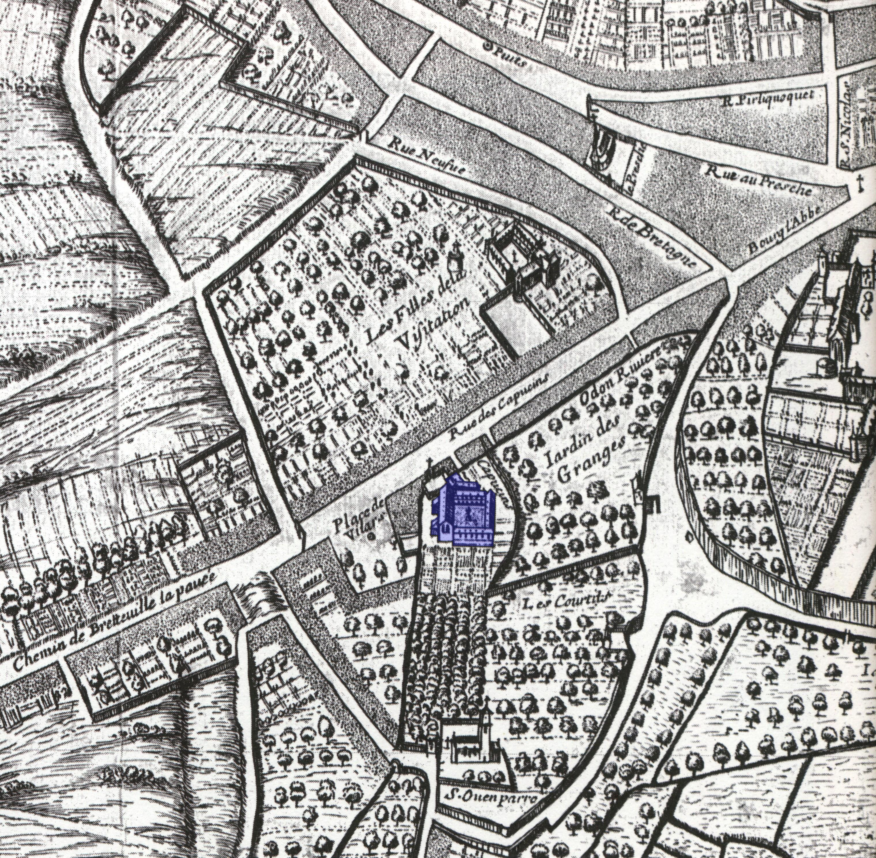 monastère des Capucins (en bleu) dans les années 1670.